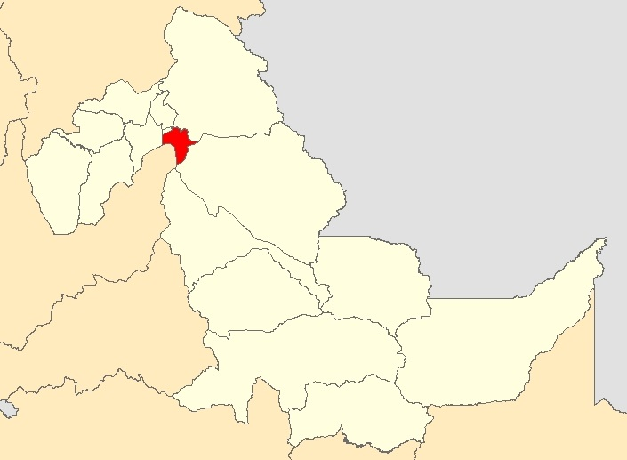 Mapa distrito Manantay,Ucayali - Perú